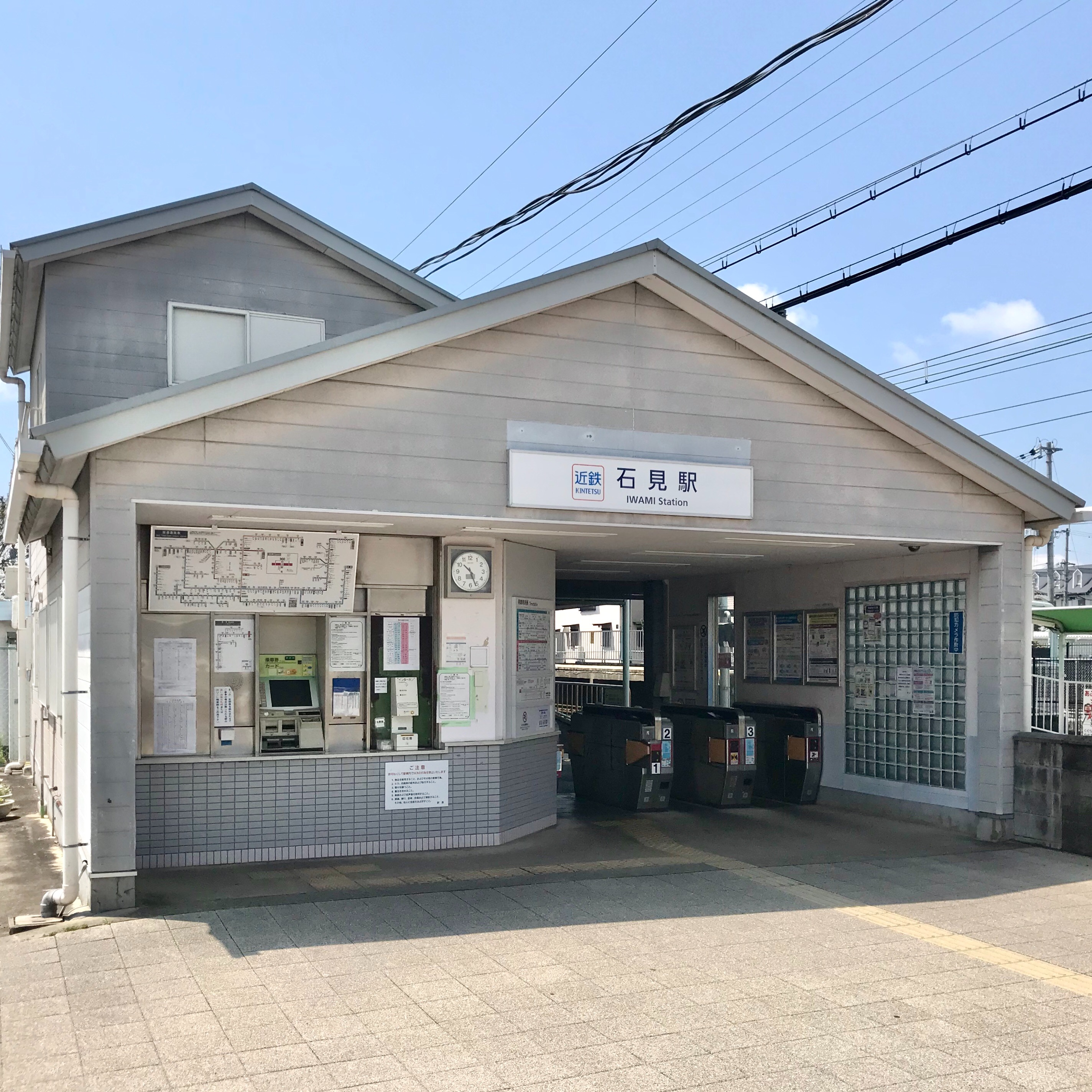 近鉄石見駅